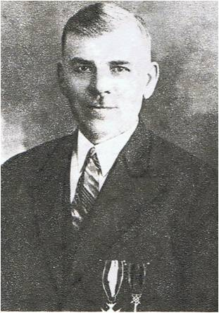 Wiktor Wiechaczek, powstaniec śląski